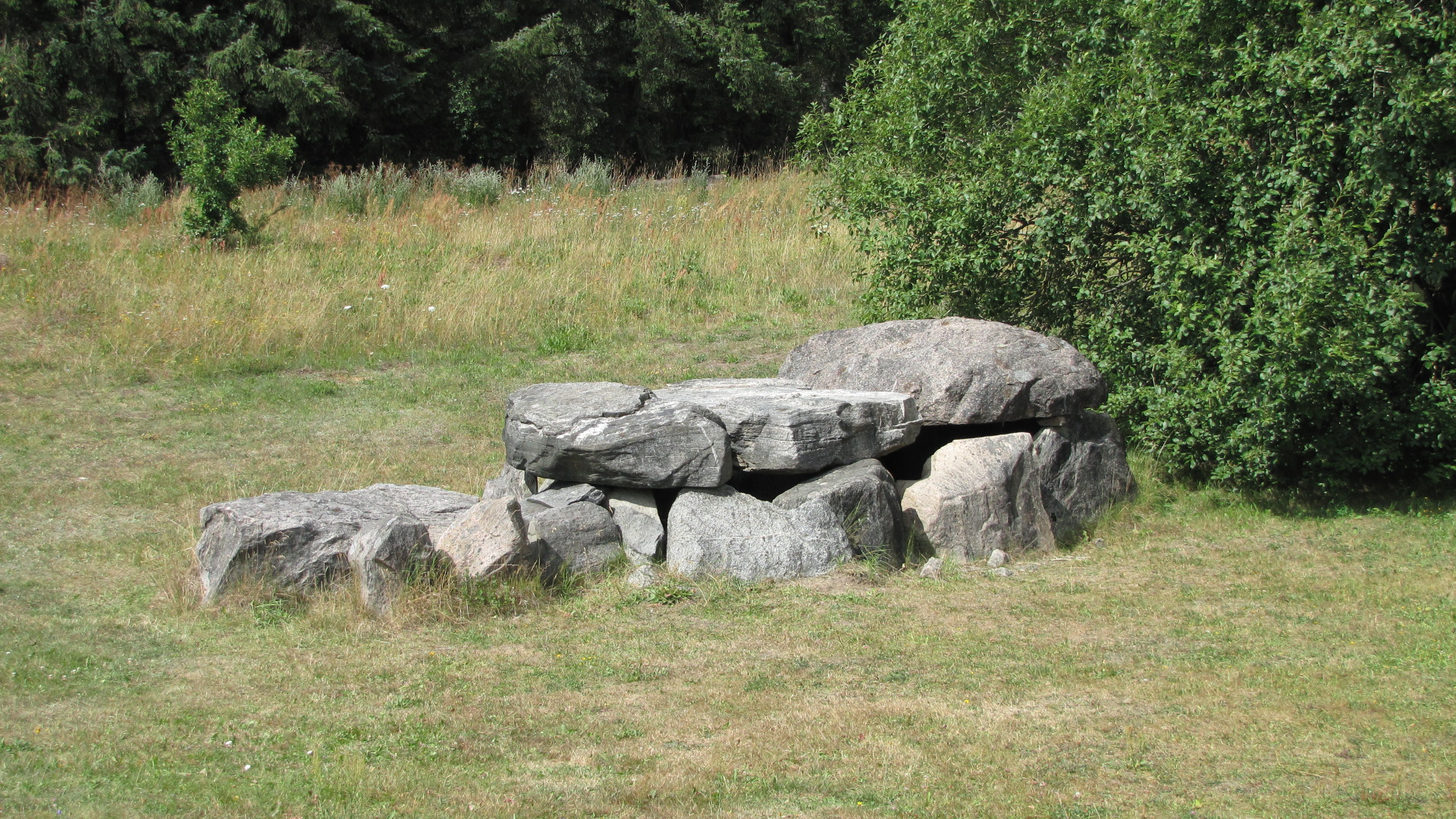 Blære